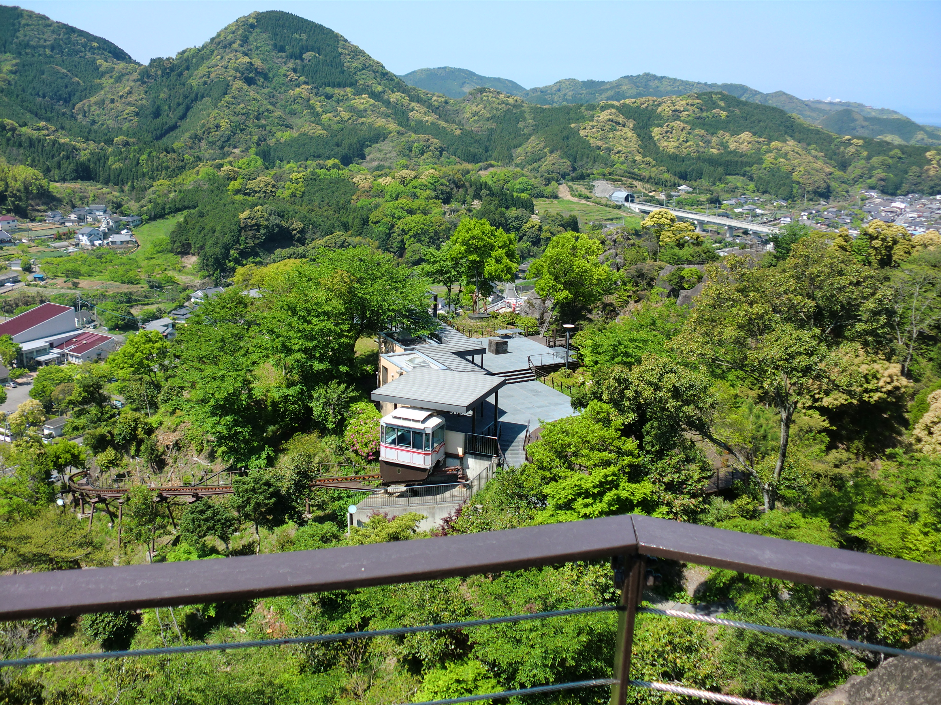 熊本県葦北郡津奈木町にある舞鶴城（まいづるじょう）公園